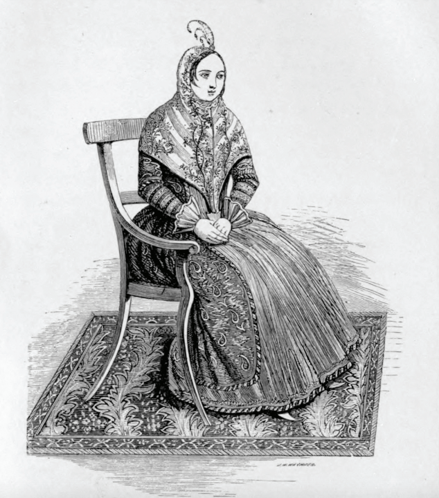 הנוסעת הבריטית הראשונה שנסעה לסקר את המצב בפרס בתקופת הבאב